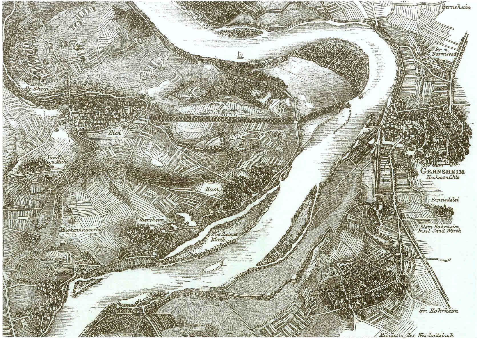 Friedrich Wilhelm Delkeskamp aus: neues Panorama des Rheins, Frankfurt/Main 1842, mit Rheinschleife "Schwarzer Ort"